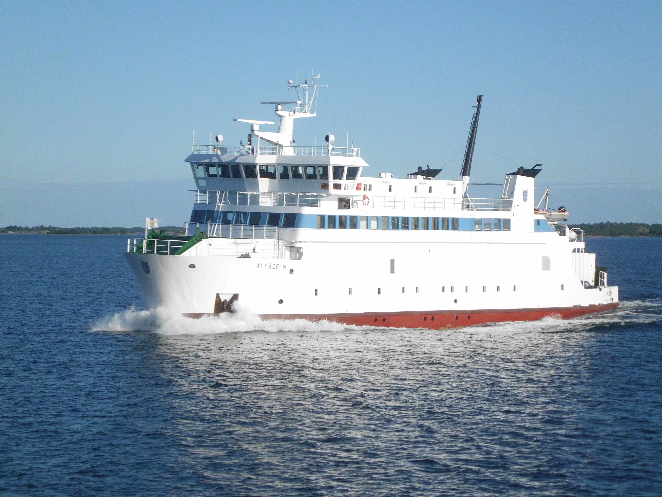 M/S Alfågeln zwischen Vårdö und Enklinge im August 2013